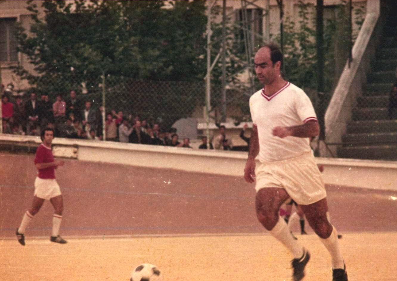 Photographie du joueur algérien Hassen Lalmas sous les couleurs du CR Belouizdad en 1967.